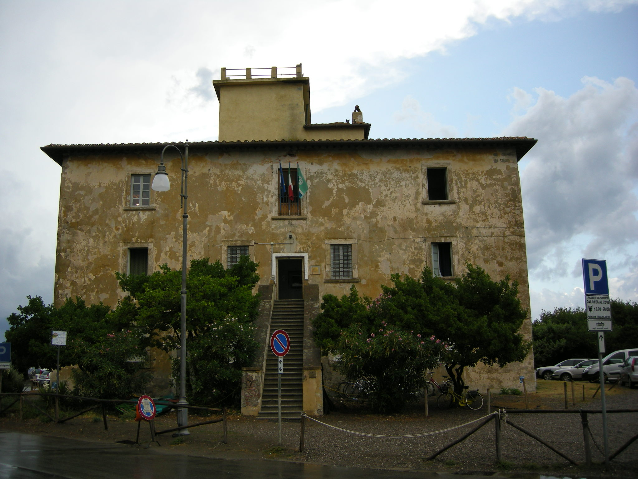 Forte di bibbona